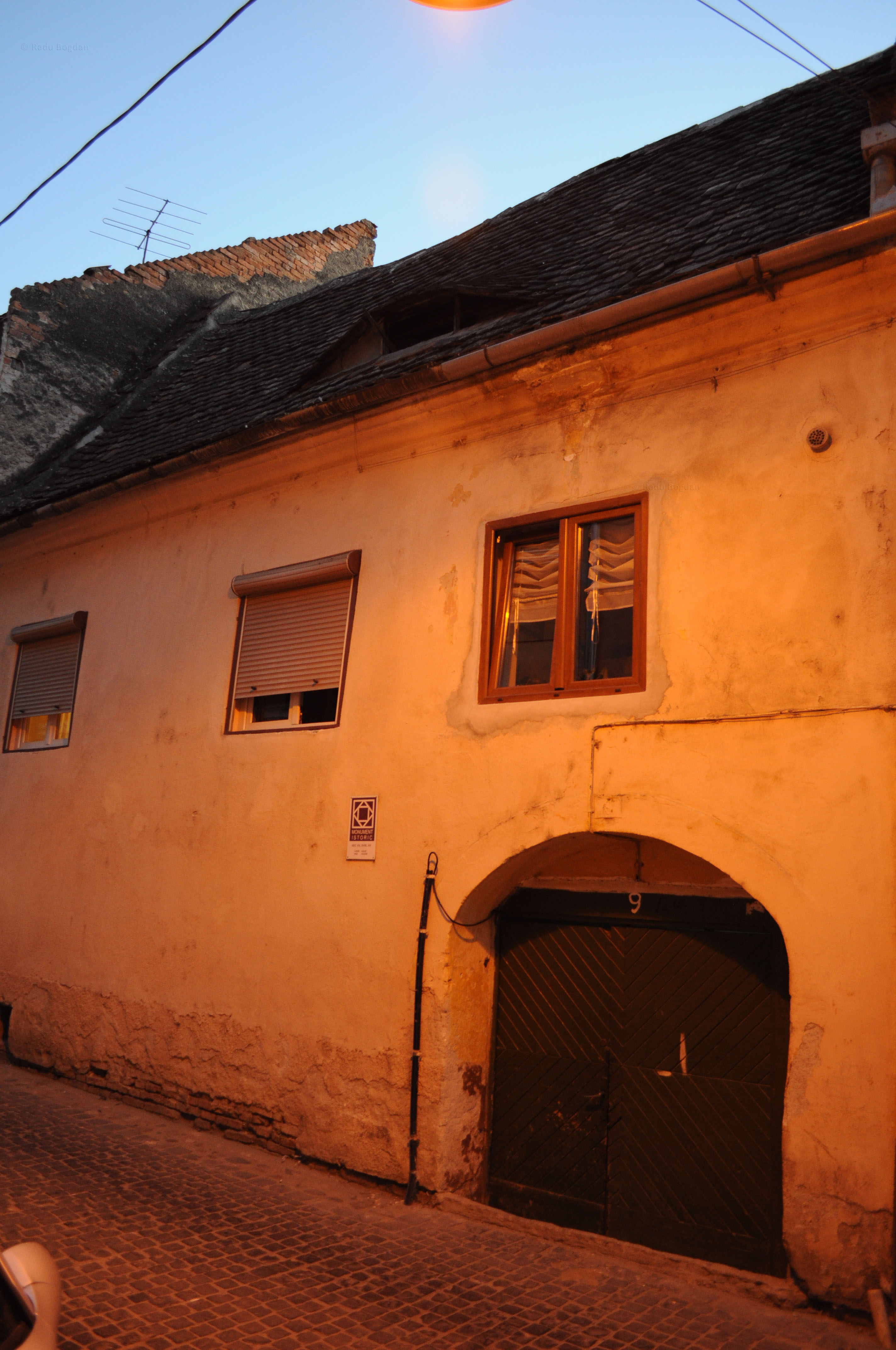 Casa - vedere laterala, Str. Argintarilor 9